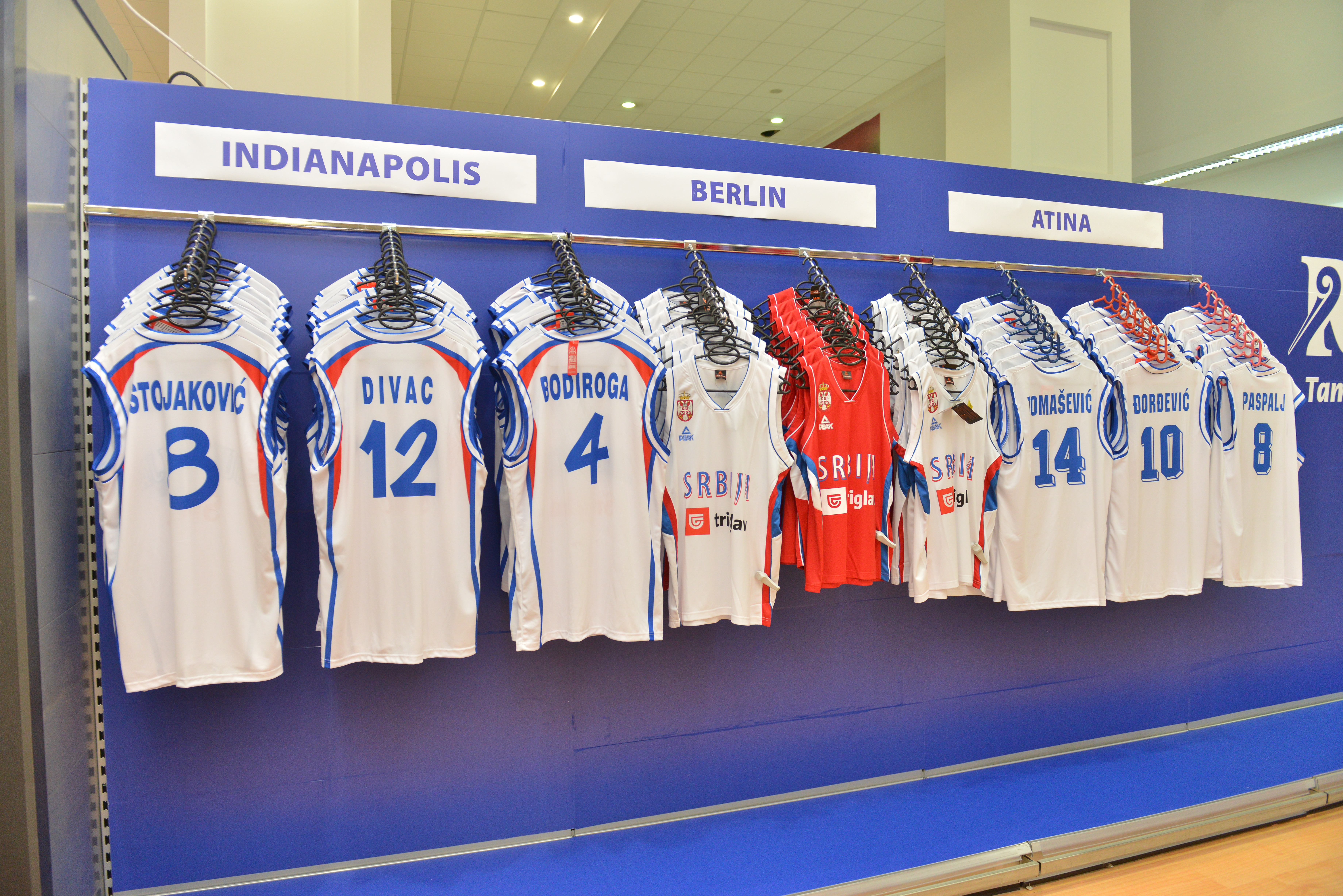 Kao ponosni sponzor srpske košarke Roda je, zajedno sa Košarkaškim savezom Srbije, otvorila četiri velika zvanična KSS šopa u svojim objektima.